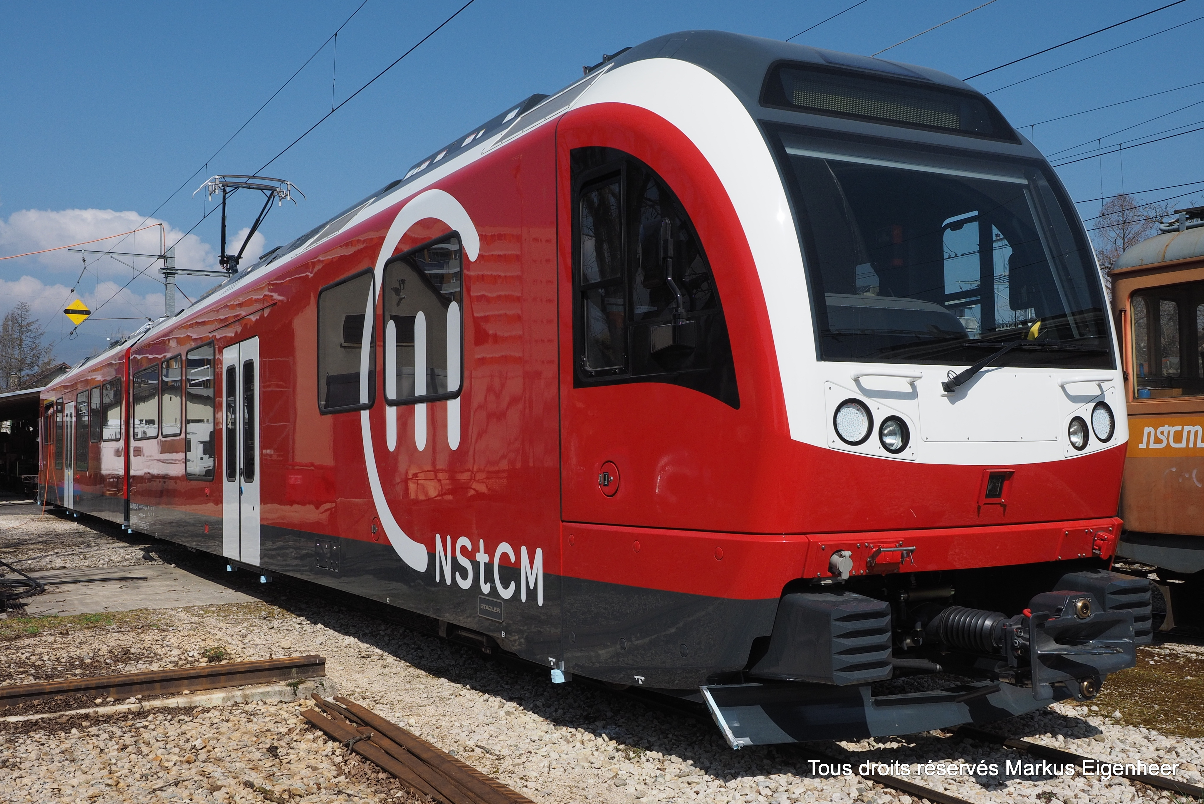 23.03.2015 Depot NStCM La Plantaz